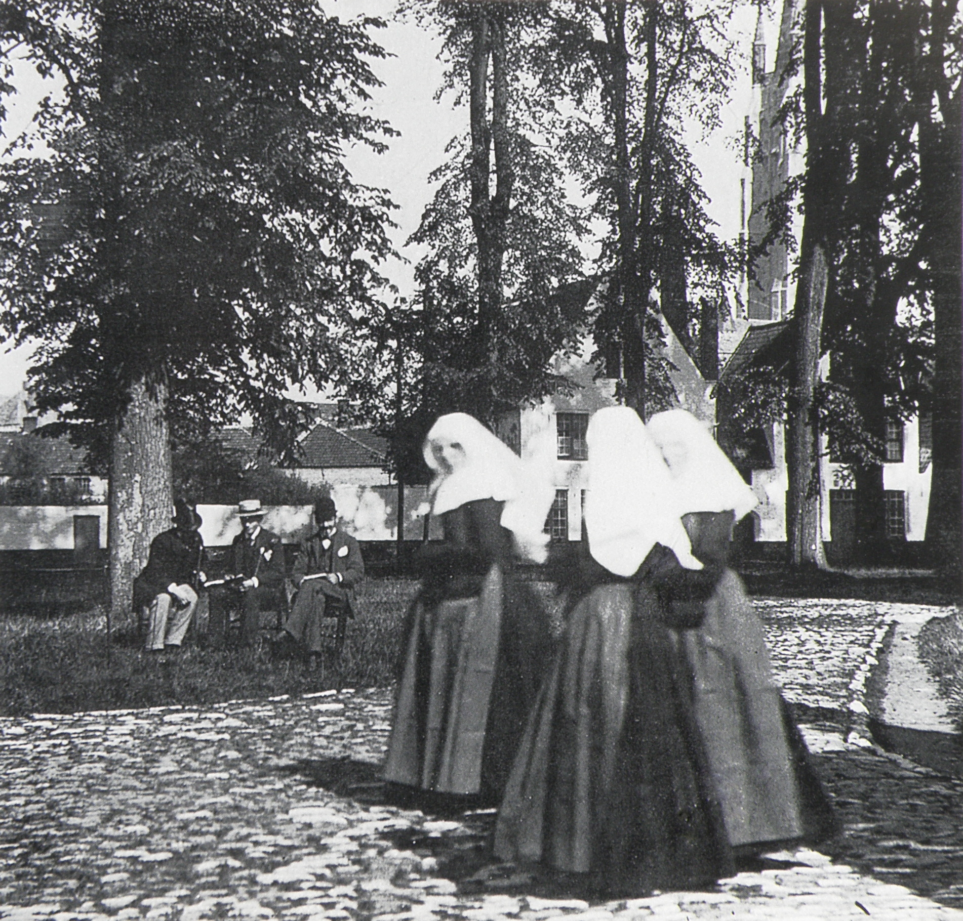 Beguinage de Bruges. Béguines observées par l'écrivain Georges Rodenbach (1855-1898). Rodenbach est au centre du groupe de trois hommes à gauche.